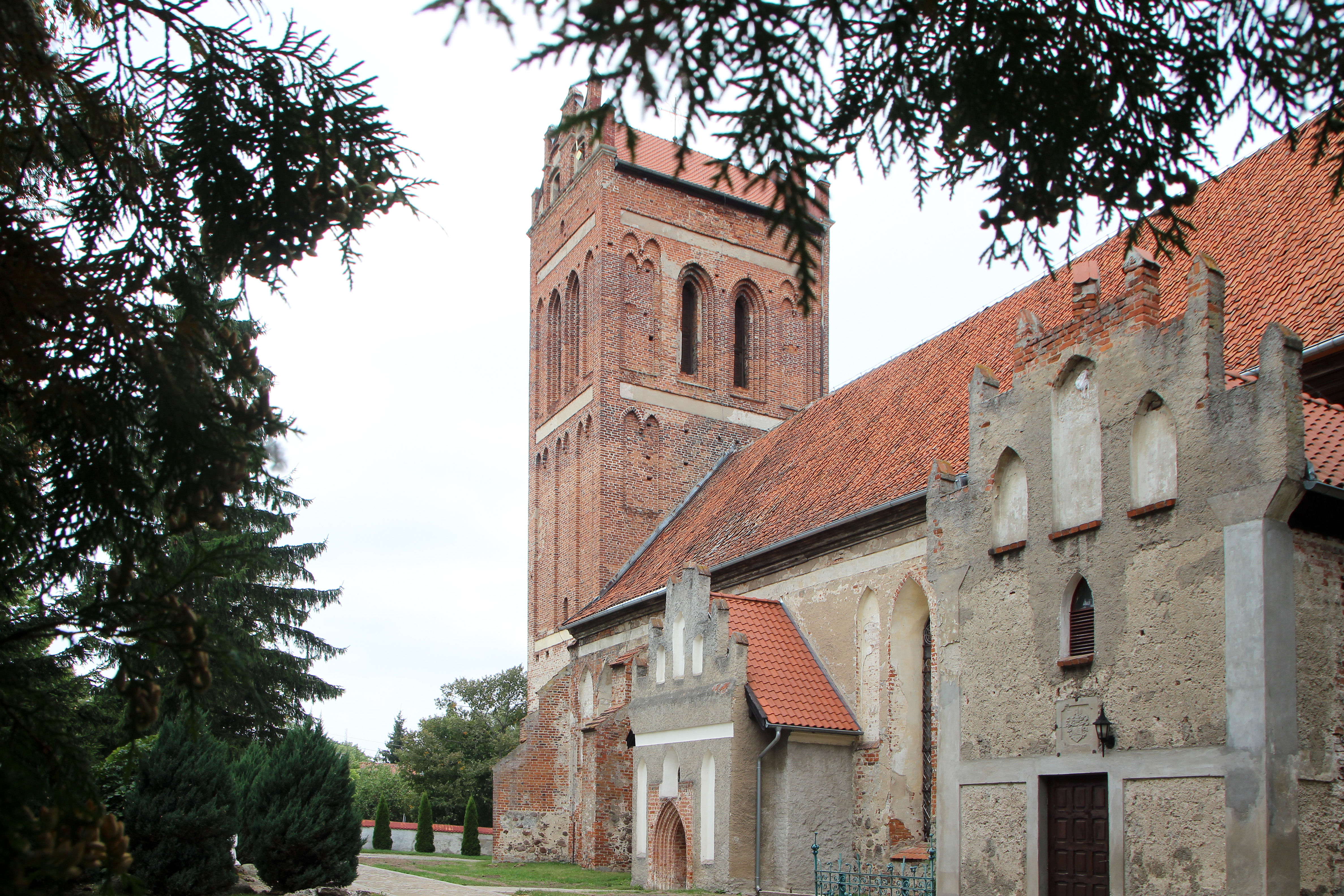 Sątoczno - wieś w Polsce położona w województwie warmińsko-mazurskim, w powiecie kętrzyńskim, w gminie Korsze.